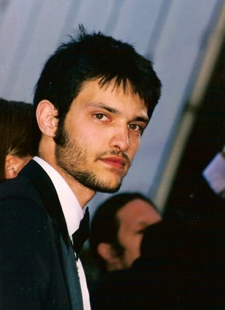 Vincent Martinez au festival de Cannes